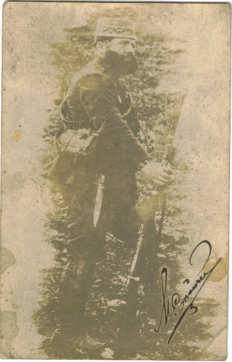 Методи Стойчев.